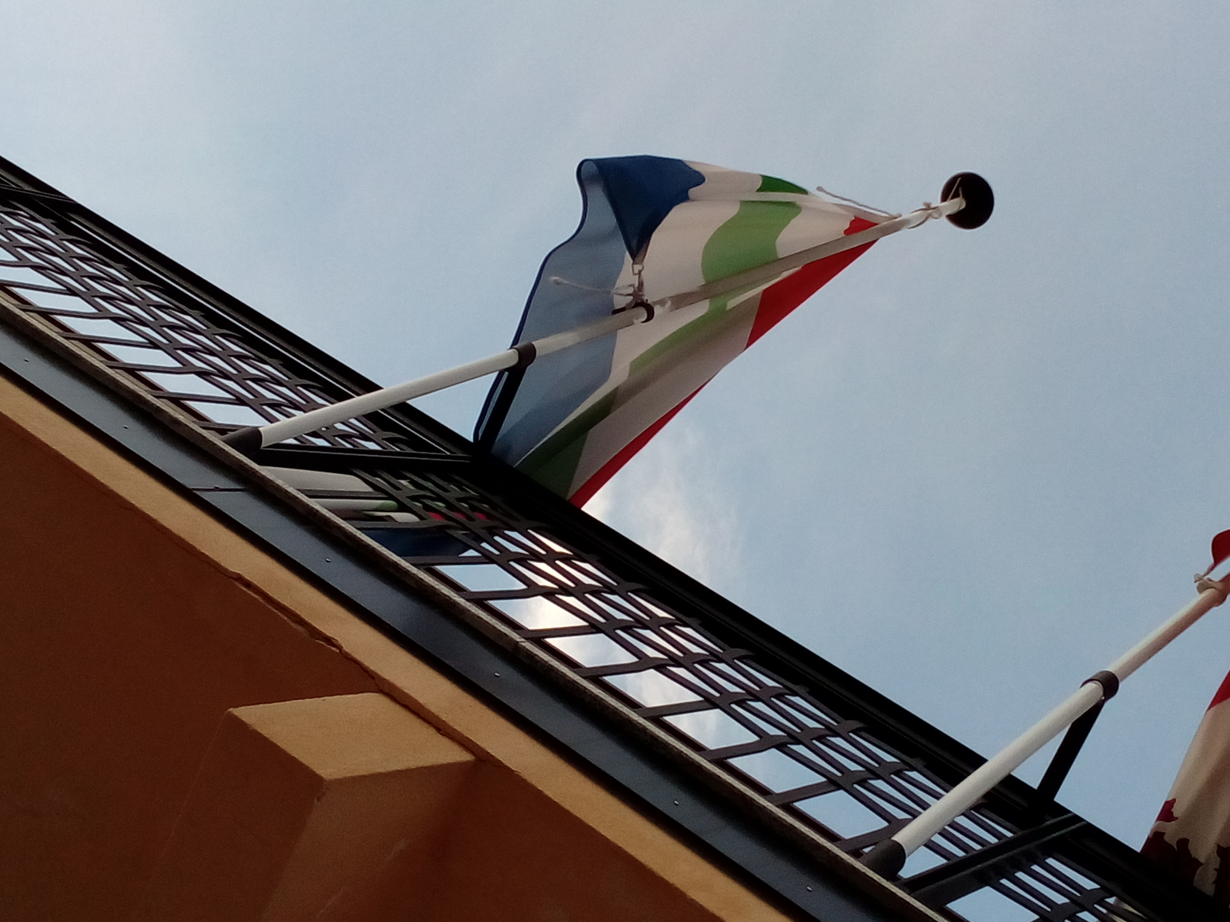 La bandera de Trescasas colgada de la casa consistorial de dicho municipio.